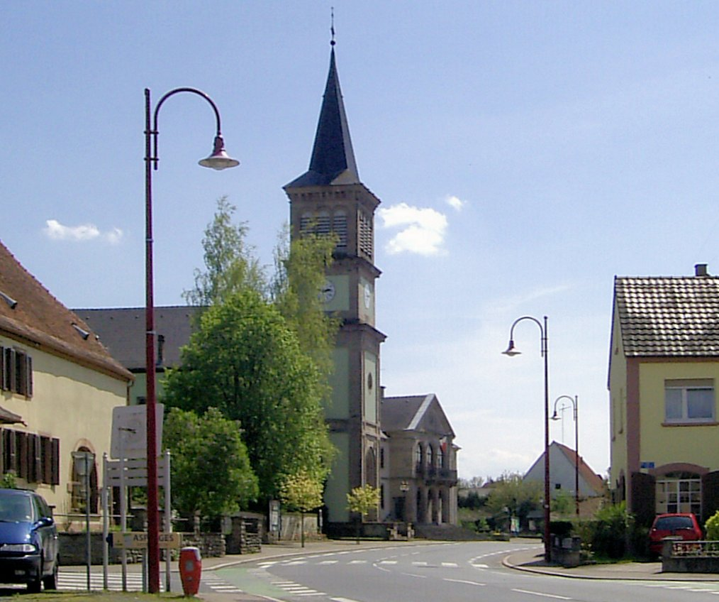 L'église luthérienne (1833) à Keskastel, Bas-Rhin